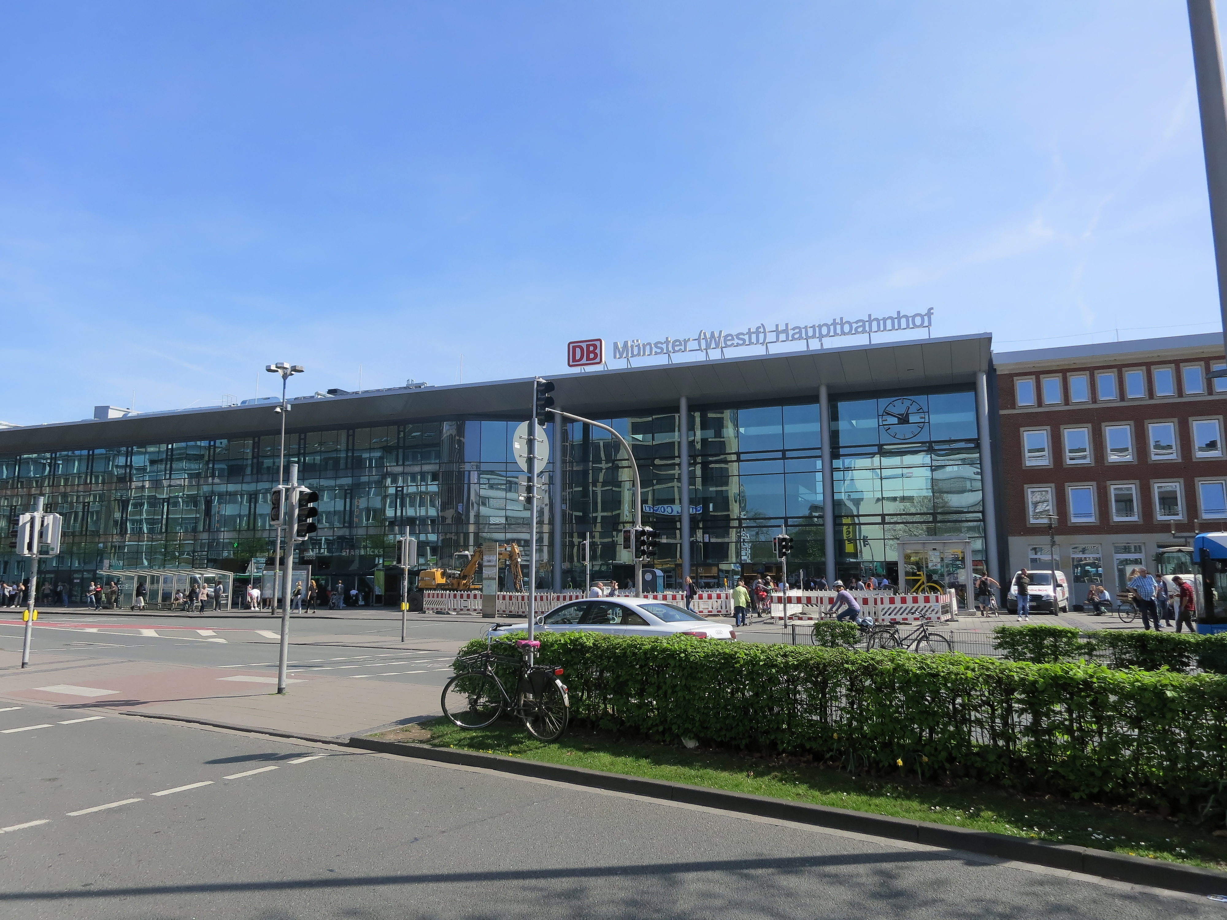 Der neue Hauptbahnhof in Münster